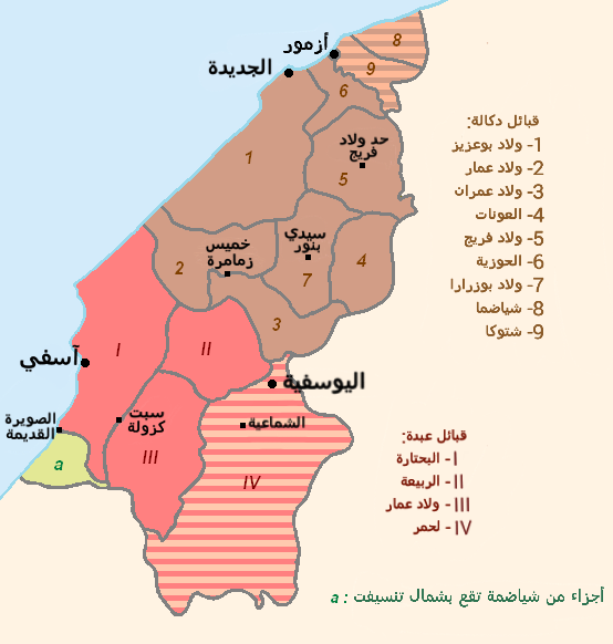 Carte représentant les tribus au sein des deux confédérations tribales de Doukkala et Abda. Une partie de la fraction Oulad Elhaj des Chiadma, établie au nord du Oued Tensift, dépend administrativement de la région Doukkala-Abda.